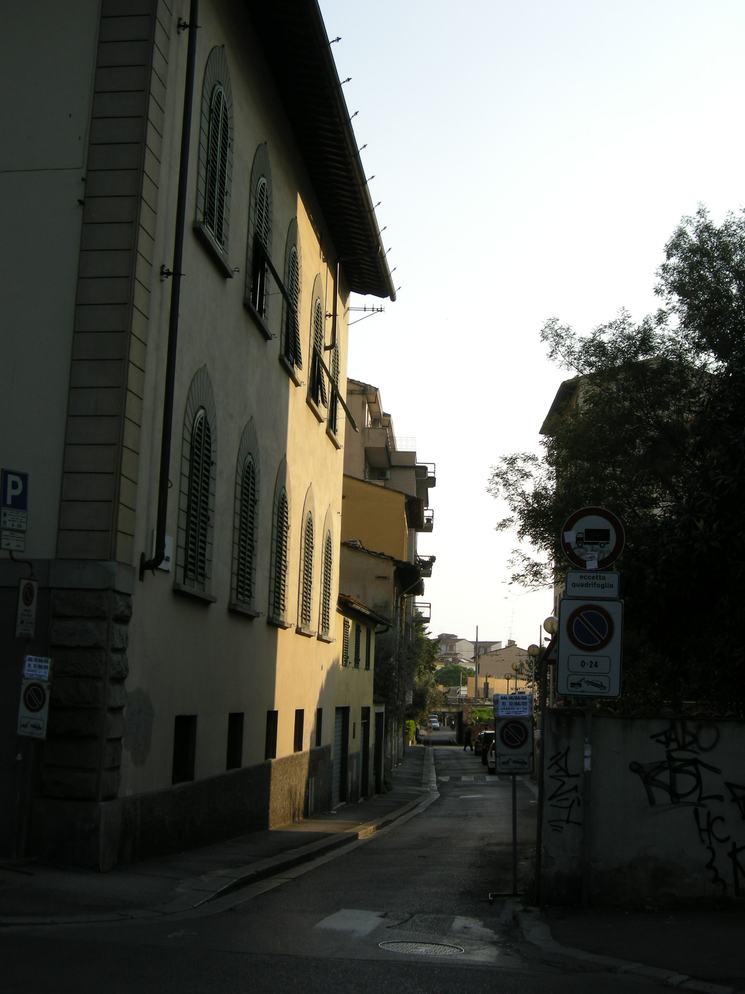 Via luigi lanzi